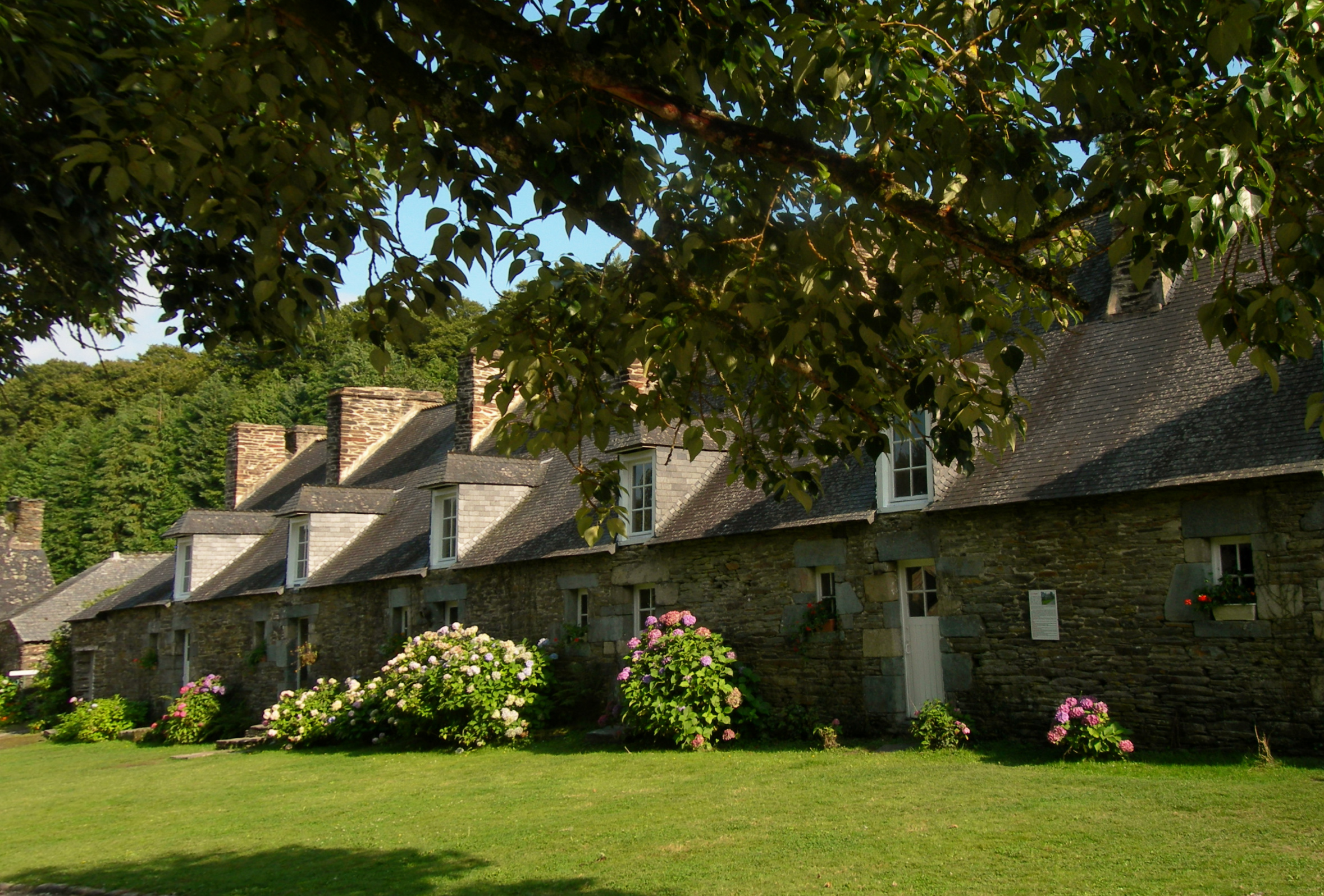 Logis des forgerons des forges des Salles